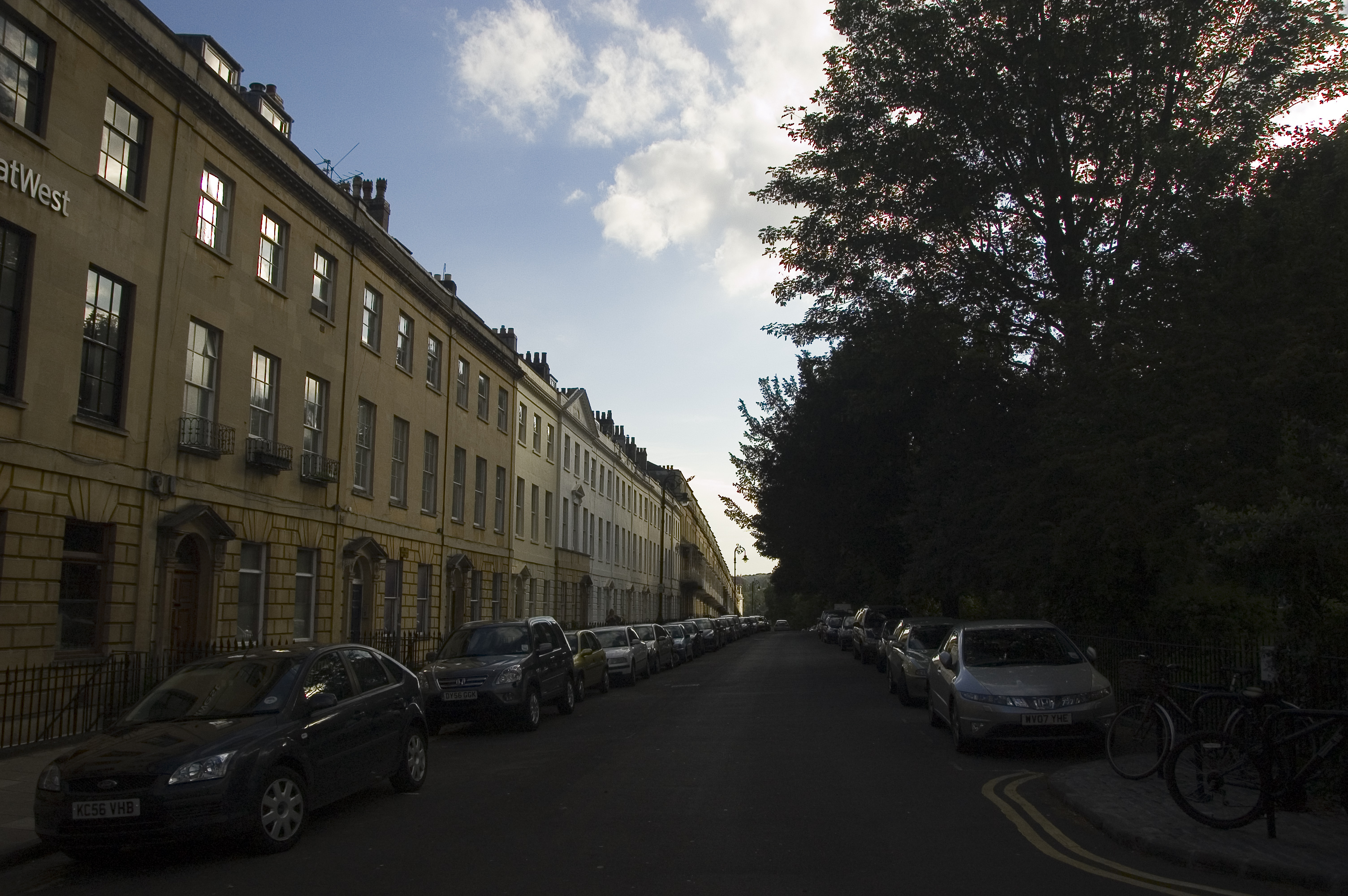 Caledonia Place, Bristol